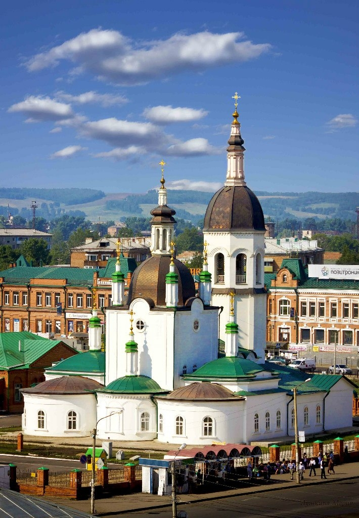 Спасский собор г. Канск